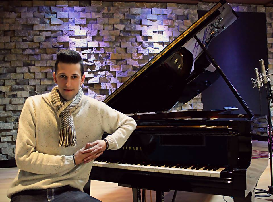 no piano no Atlântico Blue Studios